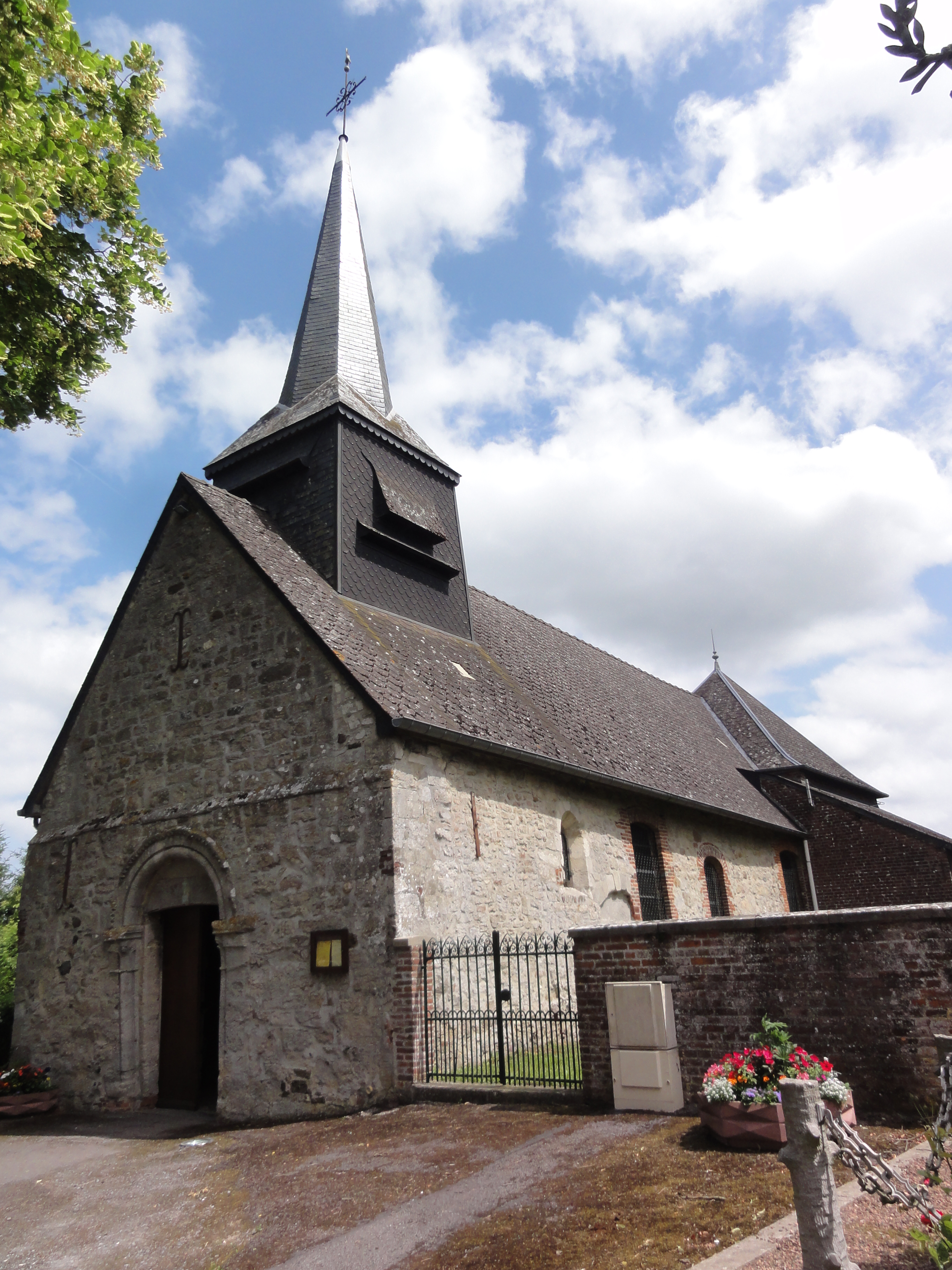 Effry (Aisne) église Saint-Laurent